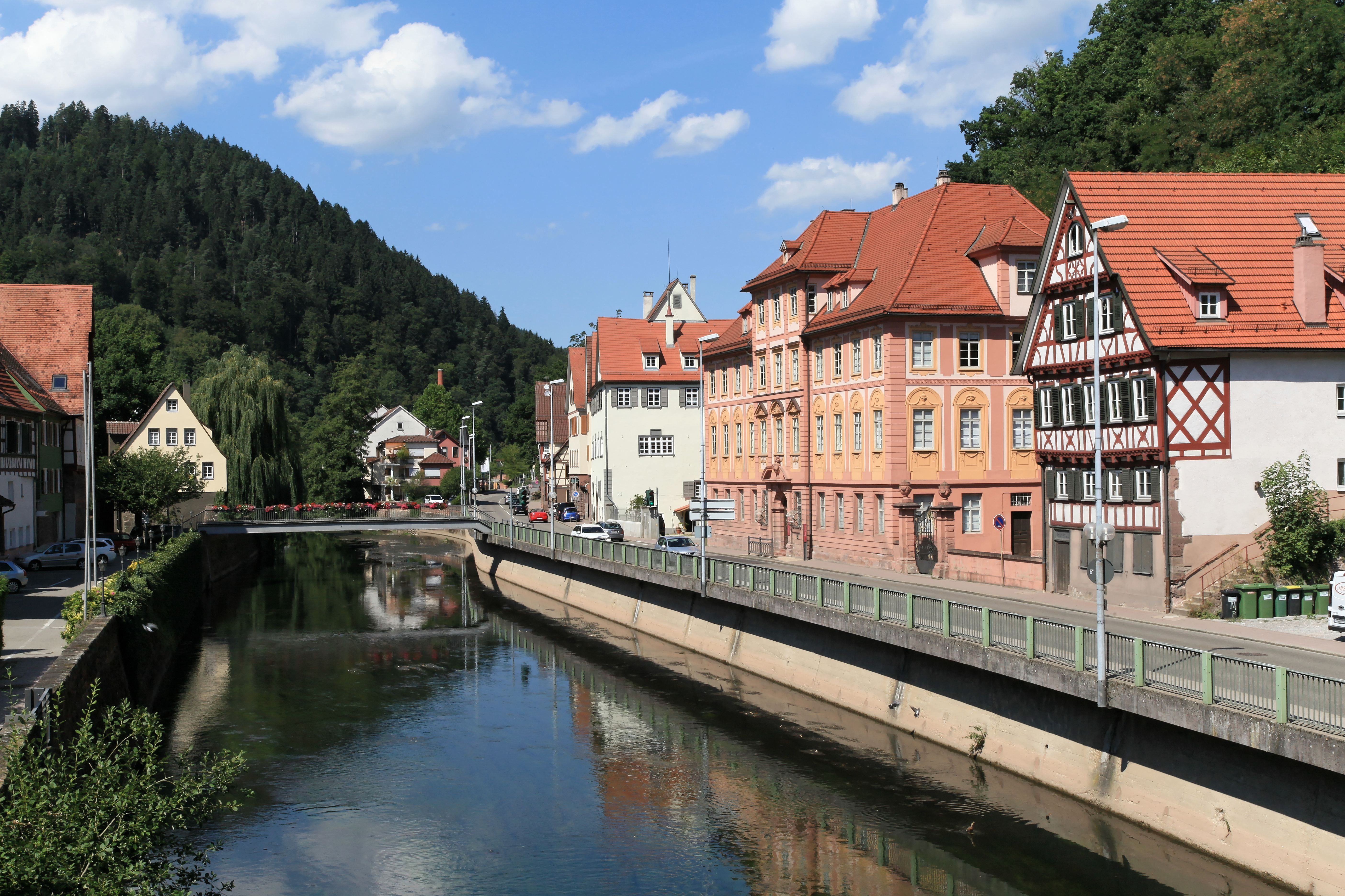 Beim Weinsteg (links), Weinsteg über die Nagold und Palais Vischer und Steinhaus an der Bischofstraße (rechts) in Calw